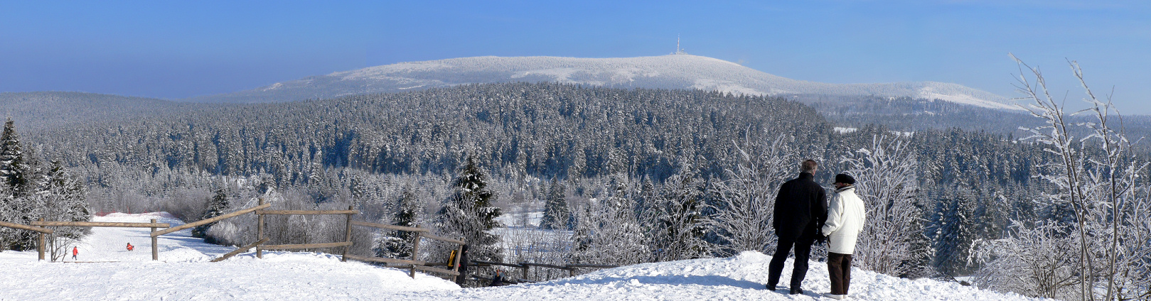 Brocken-Panorama von Torfhaus aus gesehen